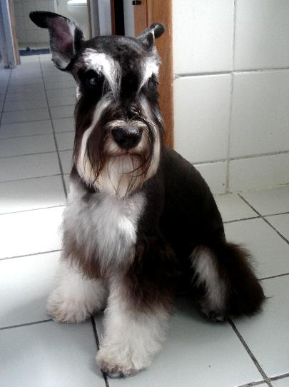 Schnauzer preto-e-prata com demarcações bem definidas.